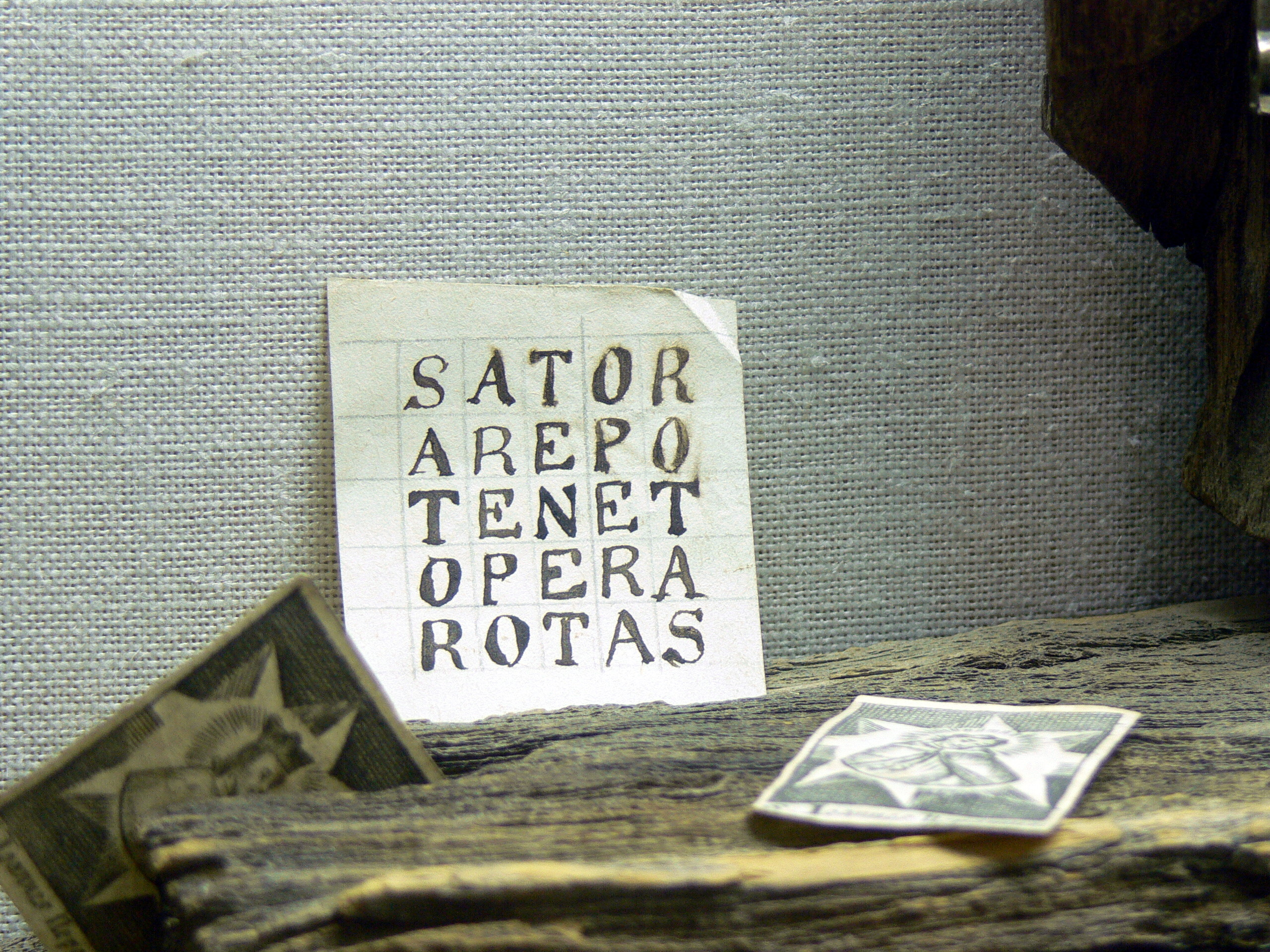 Volkskundemuseum Dietenheim in Südtirol. Zauberspruch